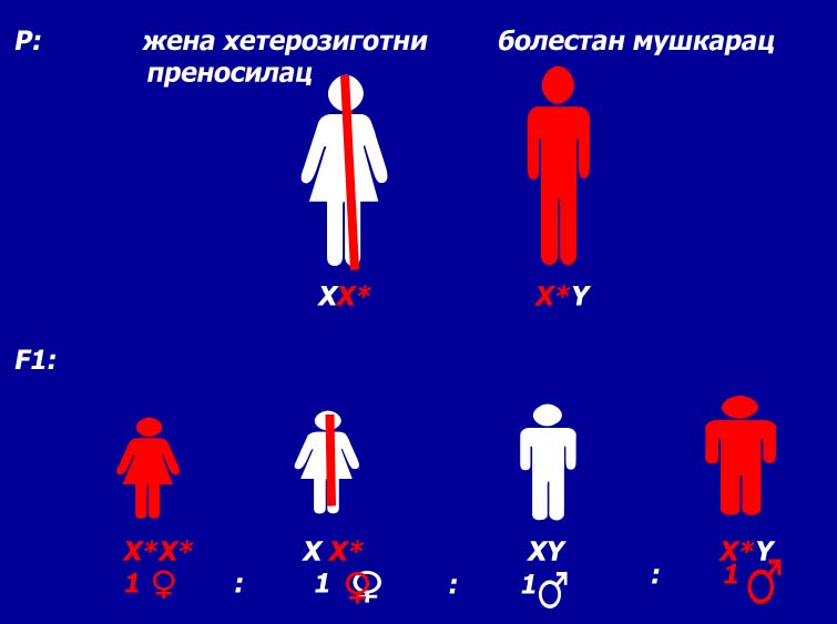 аутрор: Снежана Трифуновић